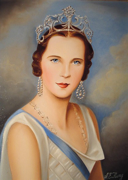 Ritratto della Regina d'Italia Maria José di Albert Edwin Flury